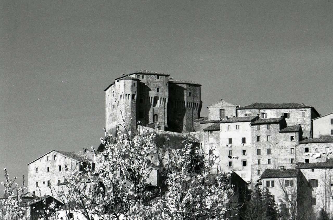 Servizio fotografico : Bentivoglio, 1977 / Paolo Monti. - Strisce: 7, Fotogrammi complessivi: 37 : Negativo b/n, gelatina bromuro d'argento/ pellicola ; 35 mm. - ((Sul portanegativi: N[I]K[MA]T FP4. - N.B. Non è stato possibile individuare precisamente cinque serie distinte, tante quante sono le localizzazioni. - Occasione: Documentazione per la pubblicazione: Gambi Lucio et al., "Strutture rurali e vita contadina", Milano-Bologna, Silvana editoriale d'arte-Federazione delle Casse di Risparmio dell'Emilia Romagna, 1977. - Fonte: Agenda di Paolo Monti: Leica 1501-3000 Controllo numerazione (1950-1978), presso Archivio Paolo Monti. - Fonte: Fattura di Paolo Monti: IV. Commesse/ Fattura n. 09/ Fotografie monumenti artistici Emilia-Romagna (1976/07/05), presso Archivio Paolo Monti. - Fonte: Monografia di Gambi, Lucio et al.: Strutture rurali e vita contadina, Milano-Bologna, Silvana editoriale d'arte-Federazione delle Casse di Risparmio dell'Emilia Romagna (1977). - Fonte: Fattura di Paolo Monti: IV. Commesse/ Fattura n. 13/ Fotografie per volume Civiltà contadina Emilia Romagna (1977/07/01), presso Archivio Paolo Monti